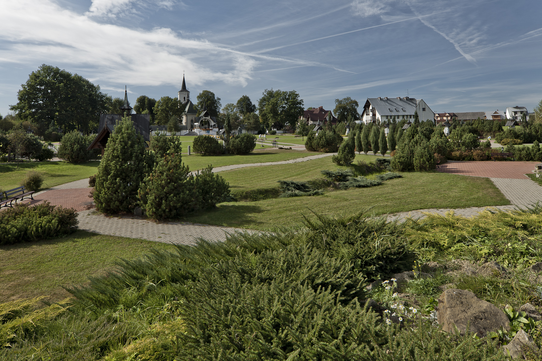 Kościół par. p.w. Wniebow. NMP, Ludźmierz - widok na ogrody przy kościele